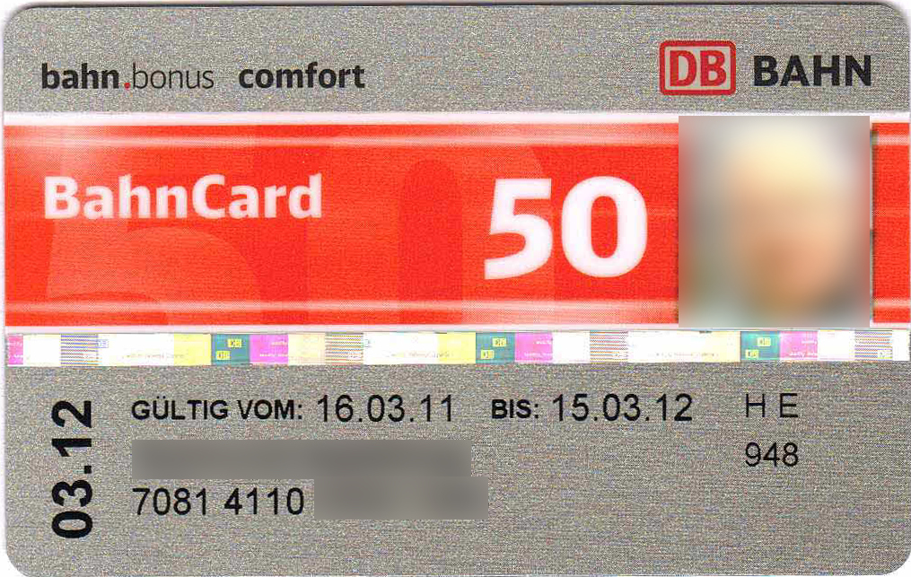 BahnCard 50 Comfort - Deutsche Bahn 2011-12